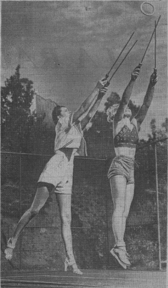 Une partie de "game of graces" (jeu des grâces) en Californie